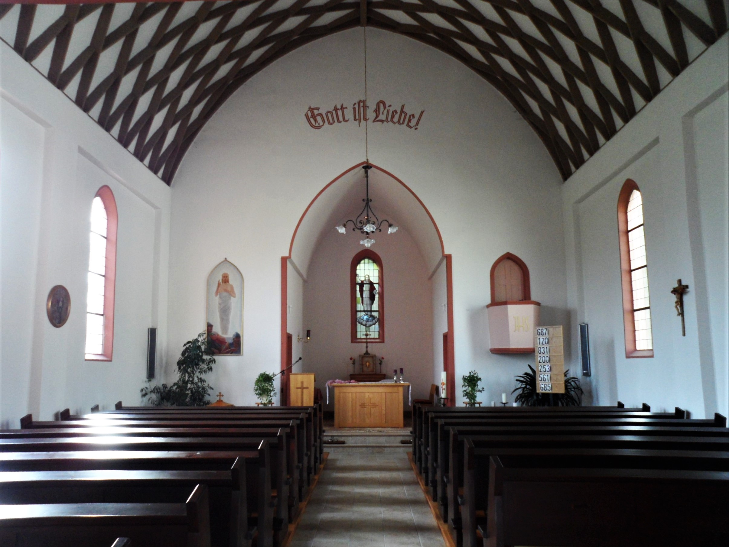 Innenansicht der altkatholischen Kirche in Fützen, Gemeinde Blumberg